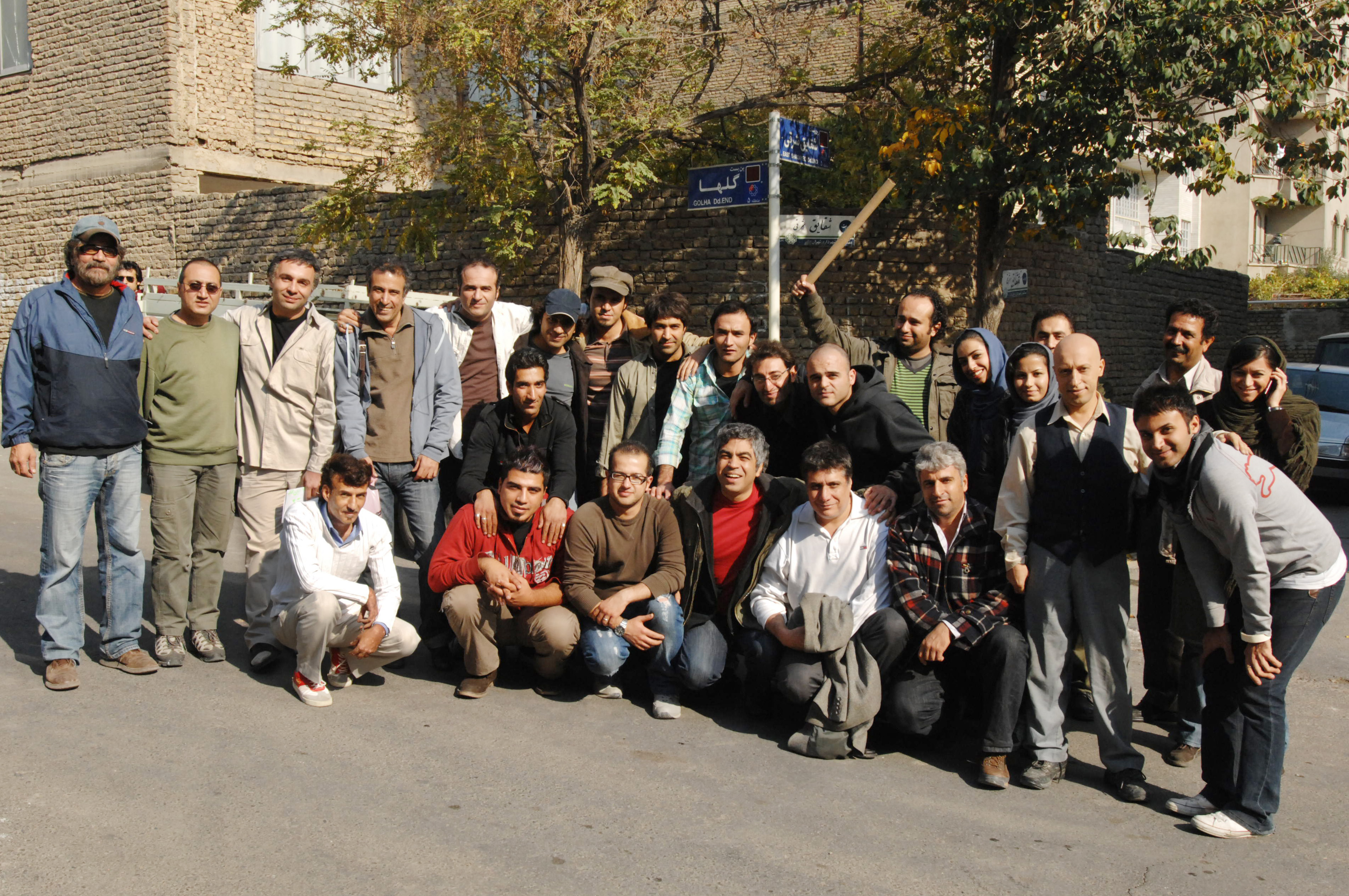 سازندگان سریال گاوصندوق